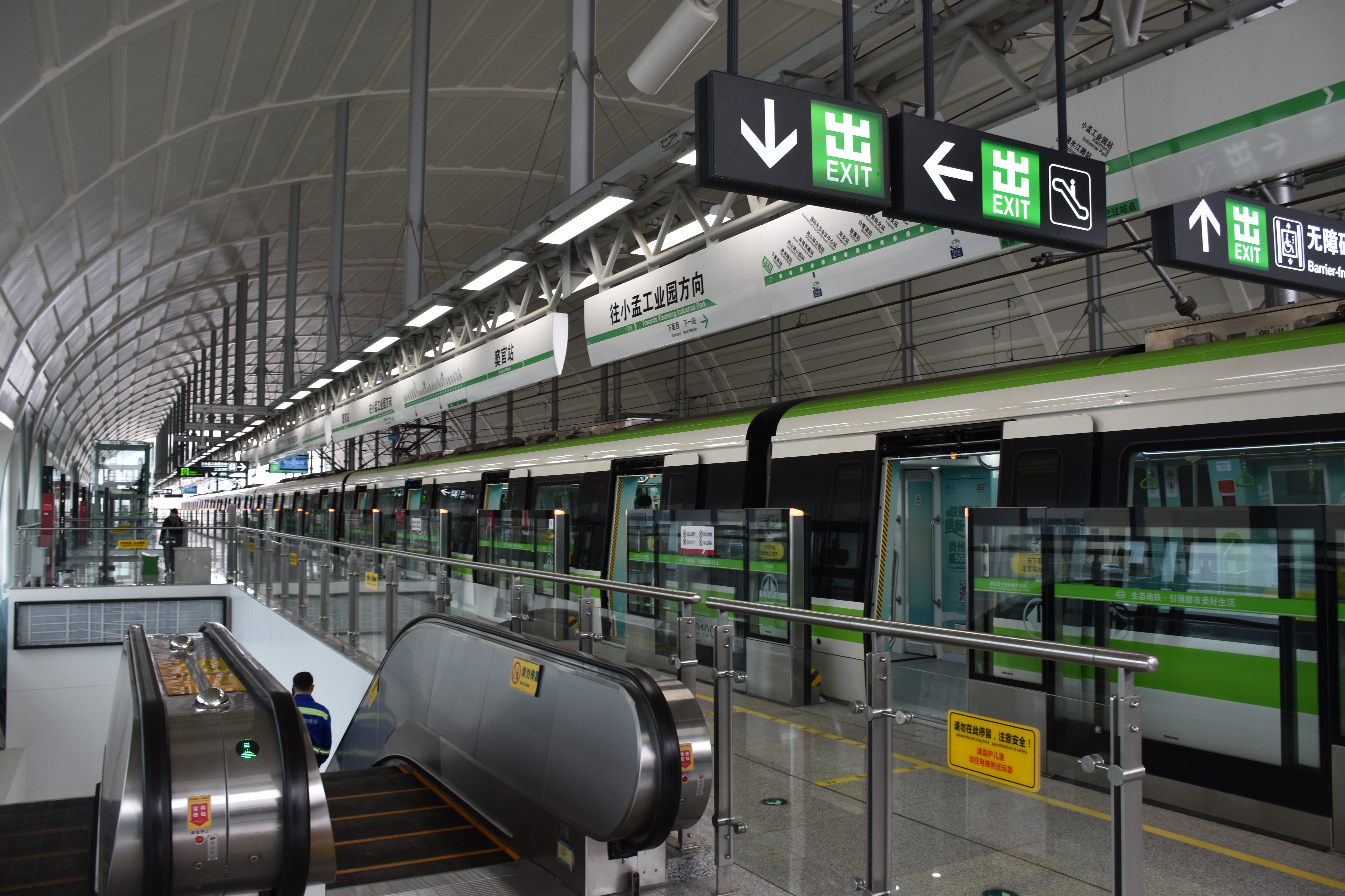 贵阳轨道交通1号线 窦官站东向站台